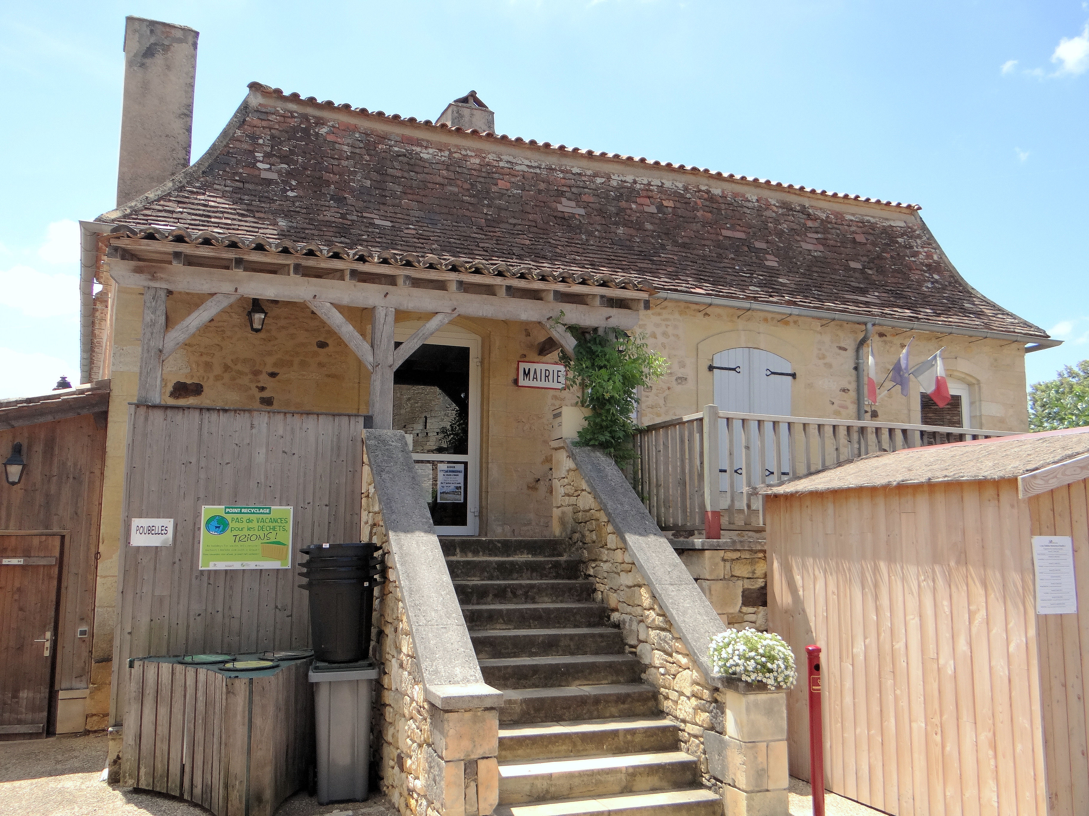 Audrix - Mairie